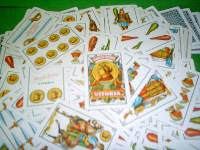 fotografia de una baraja de cartas española